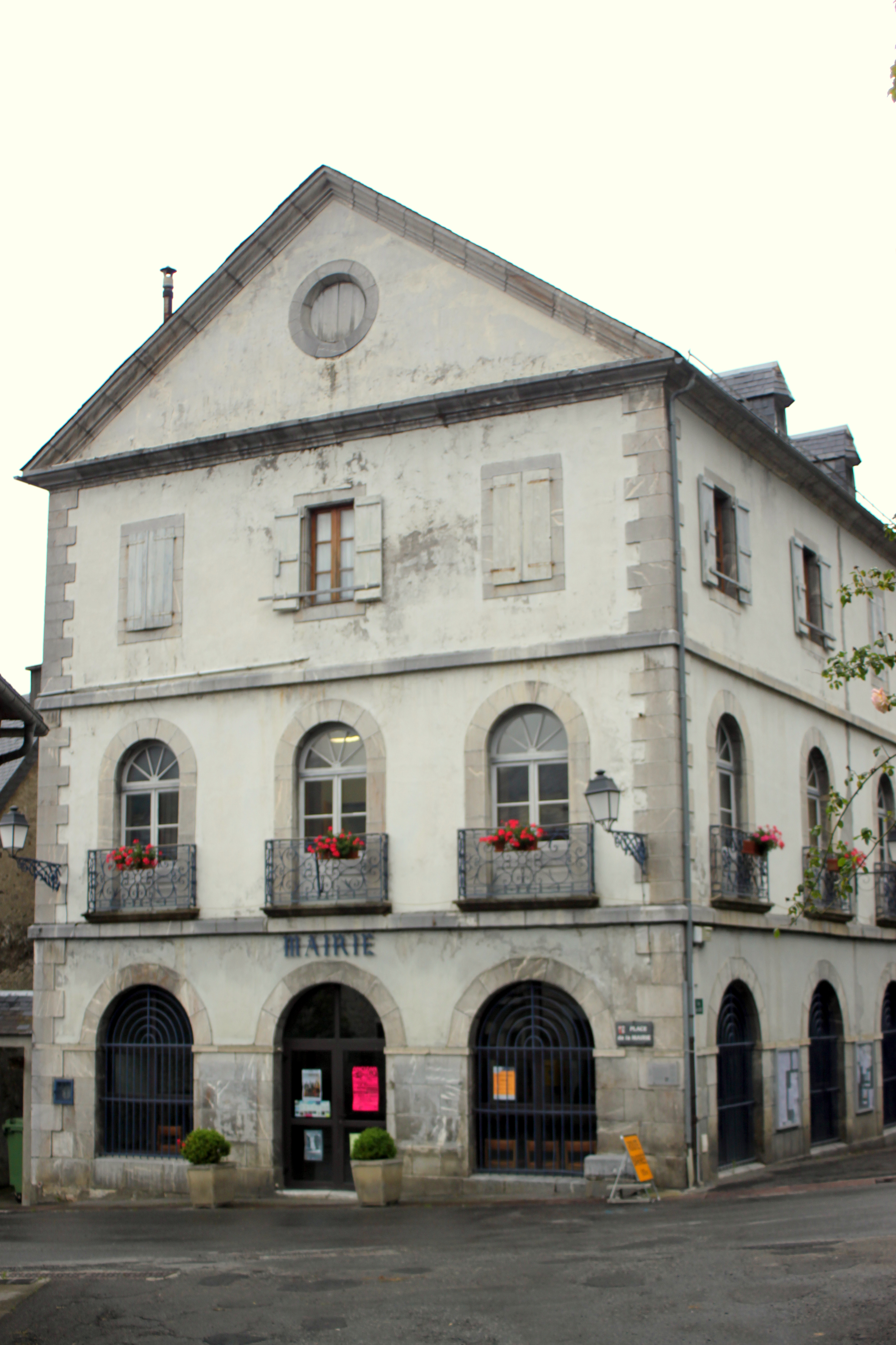 Mairie, Fr-65-Ancizan.